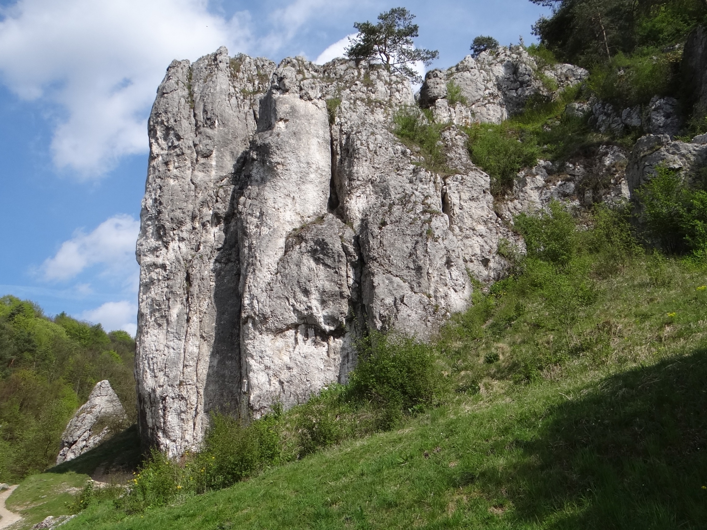 Filar Abazego w Dolinie Bolechowickiej